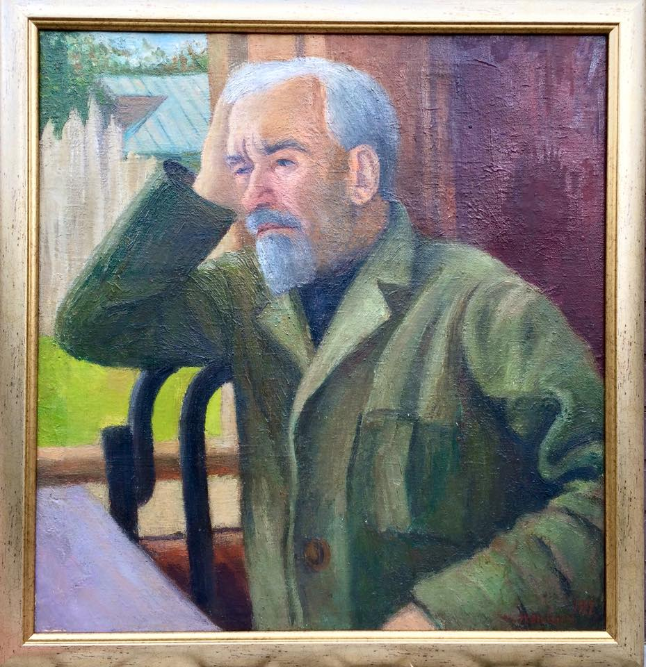 Сергей Маркин. Портрет отца Ивана Петровича Маркина.